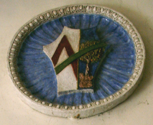 Palazzo malenchini alberti, atrio 062